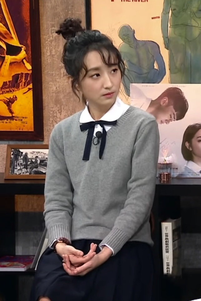 想見你陳韻如